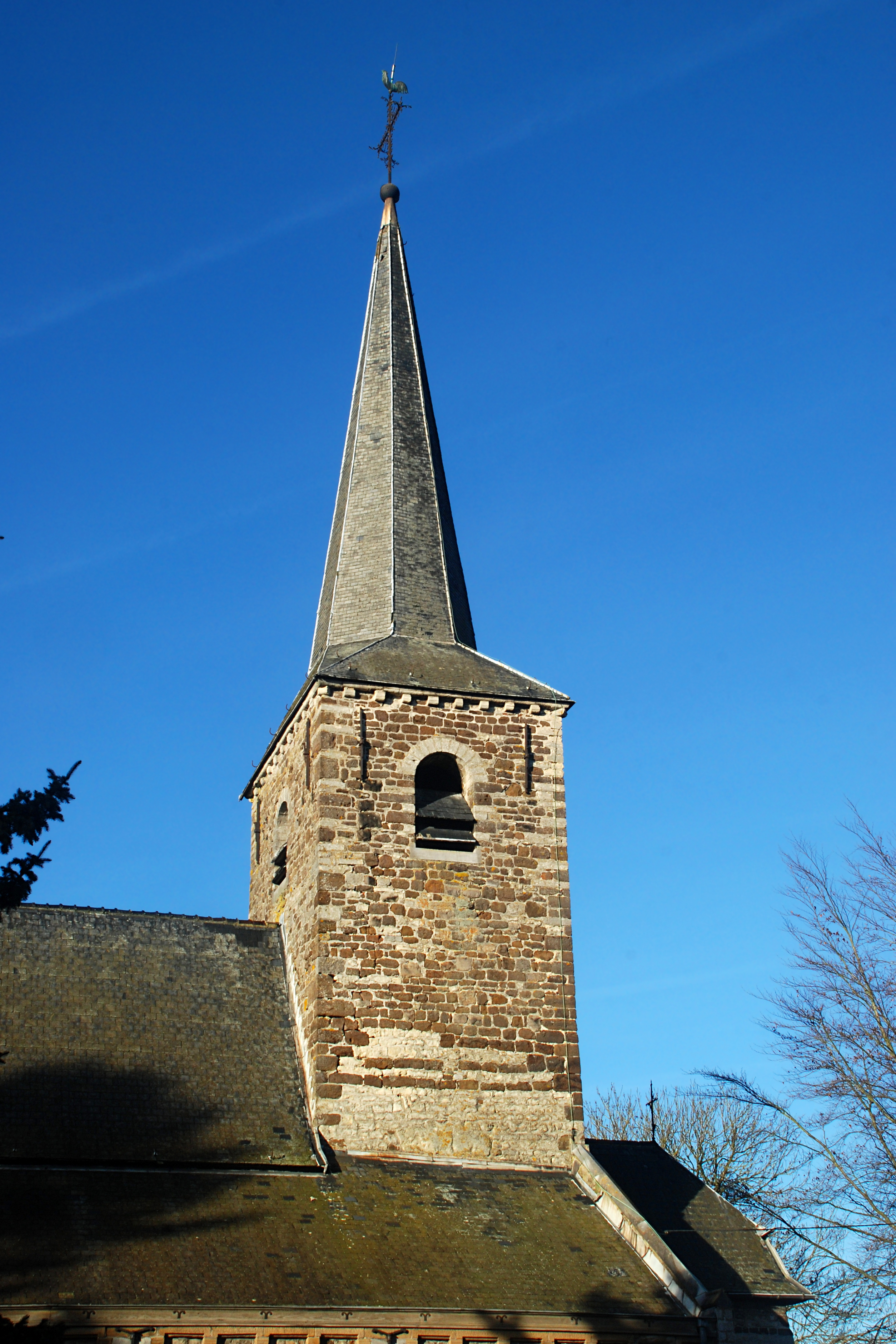 Belgique - Brabant wallon - Chaumont-Gistoux - Église Saint-Bavon de Chaumont